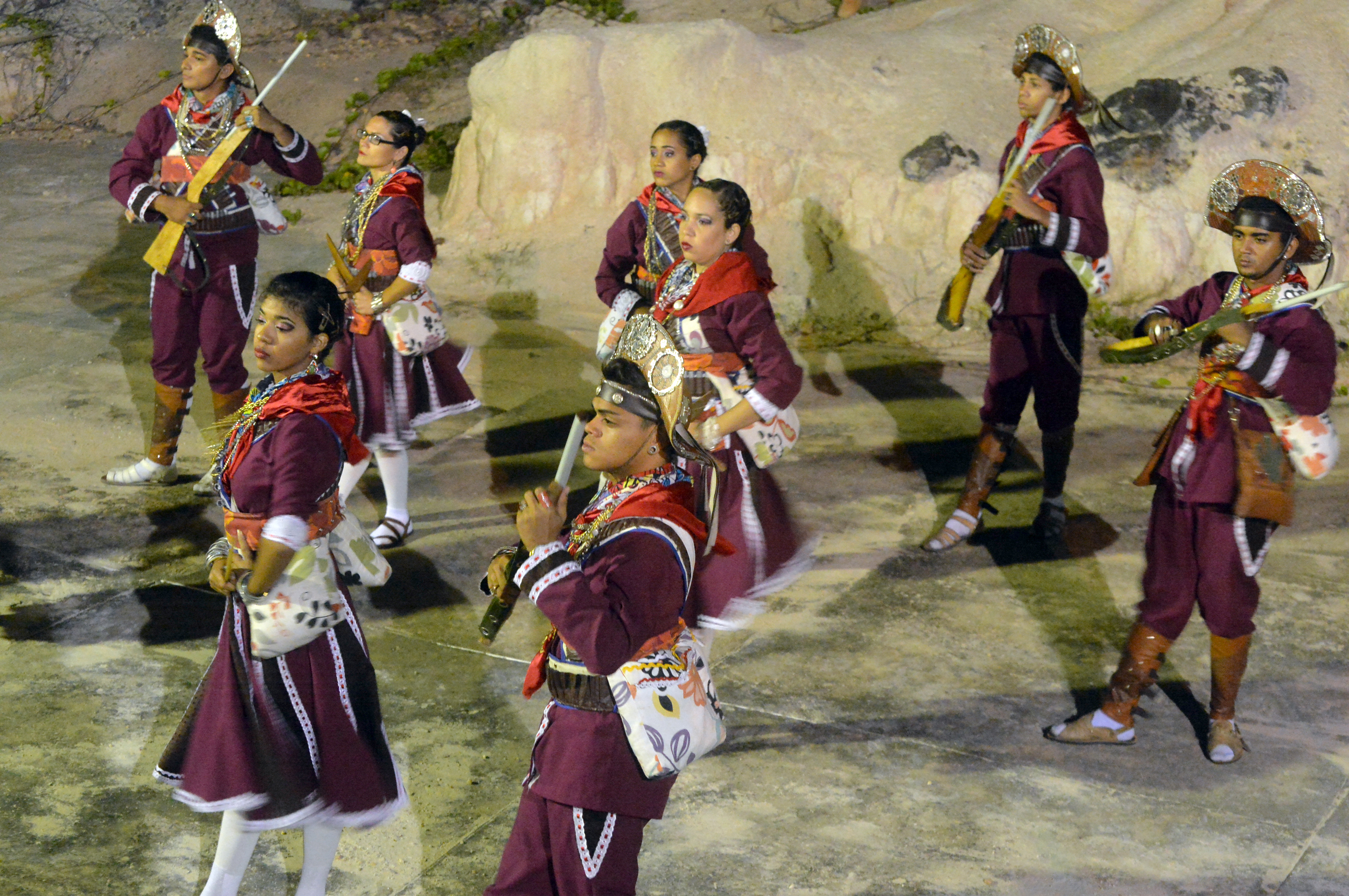 14/07/2015, Natal - RN Fotos: Tereza Sobreira